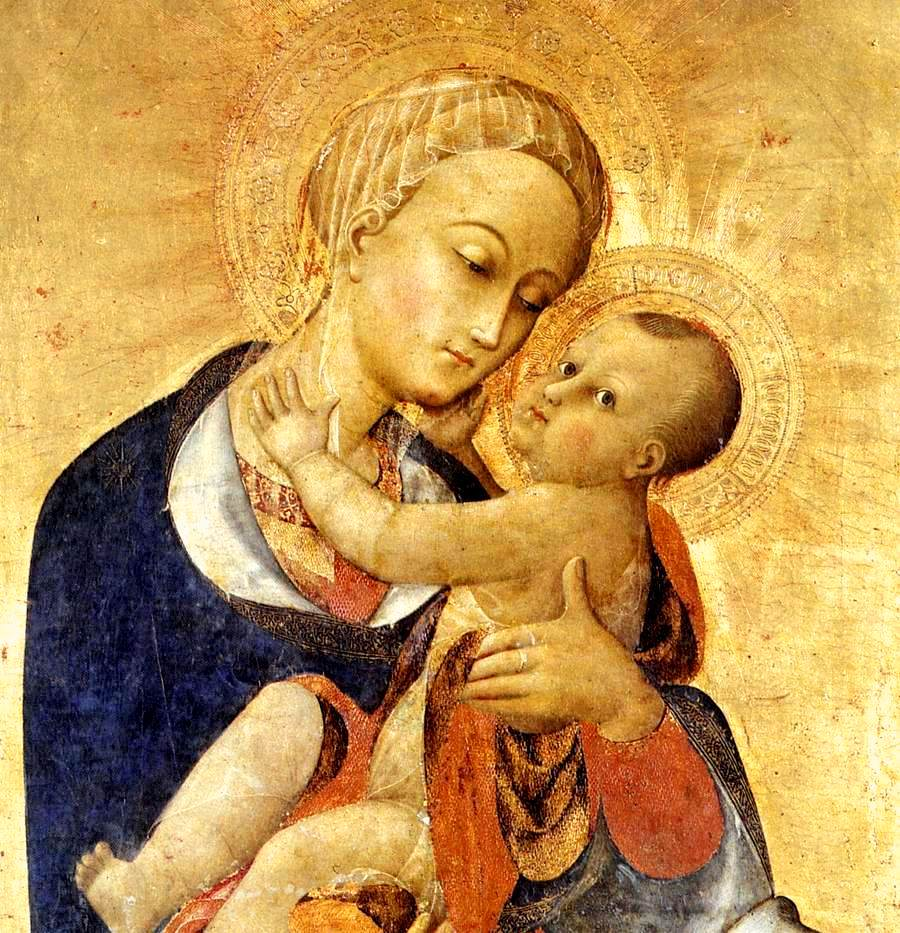 detail